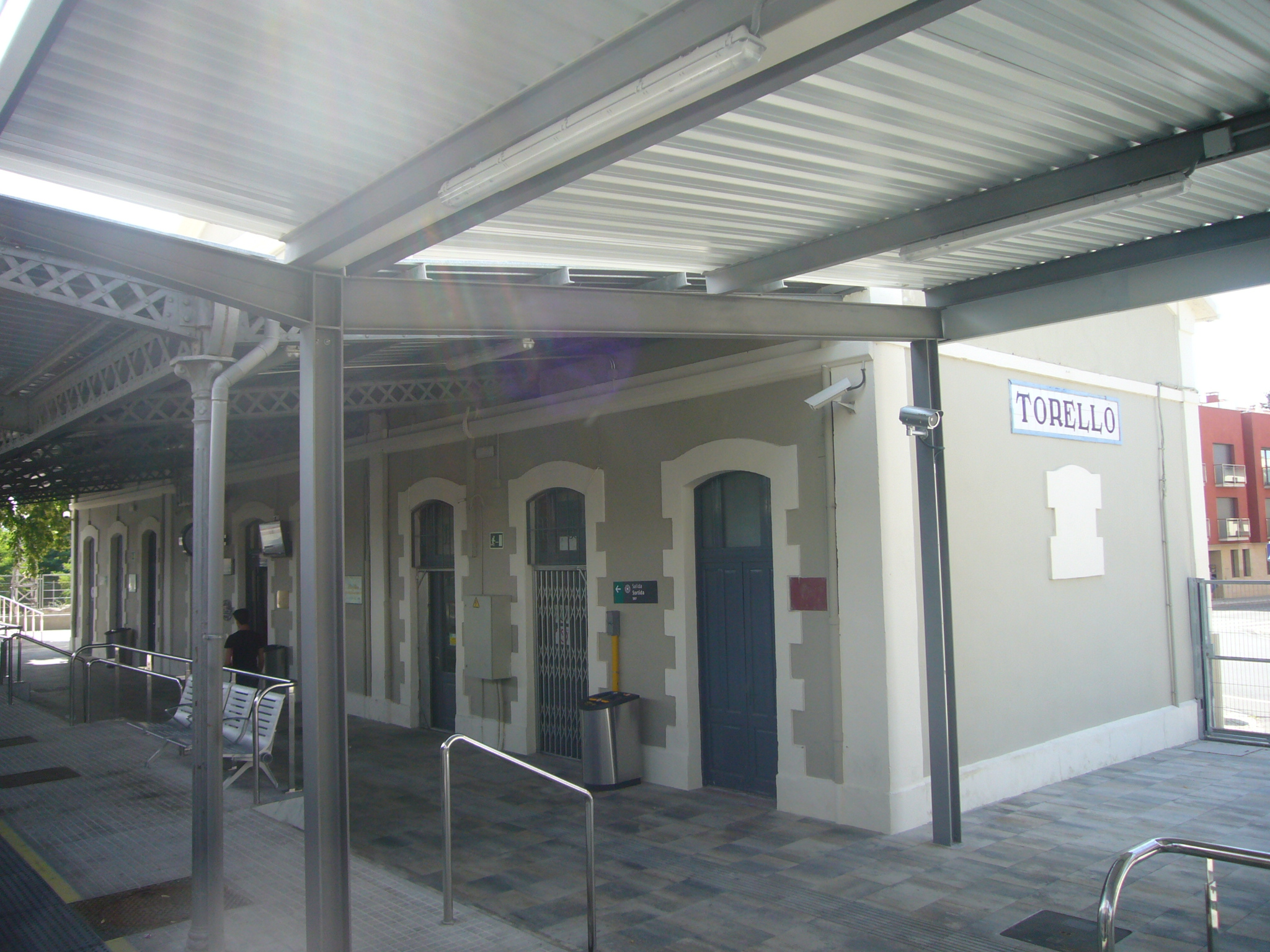 Estació de tren de Torelló